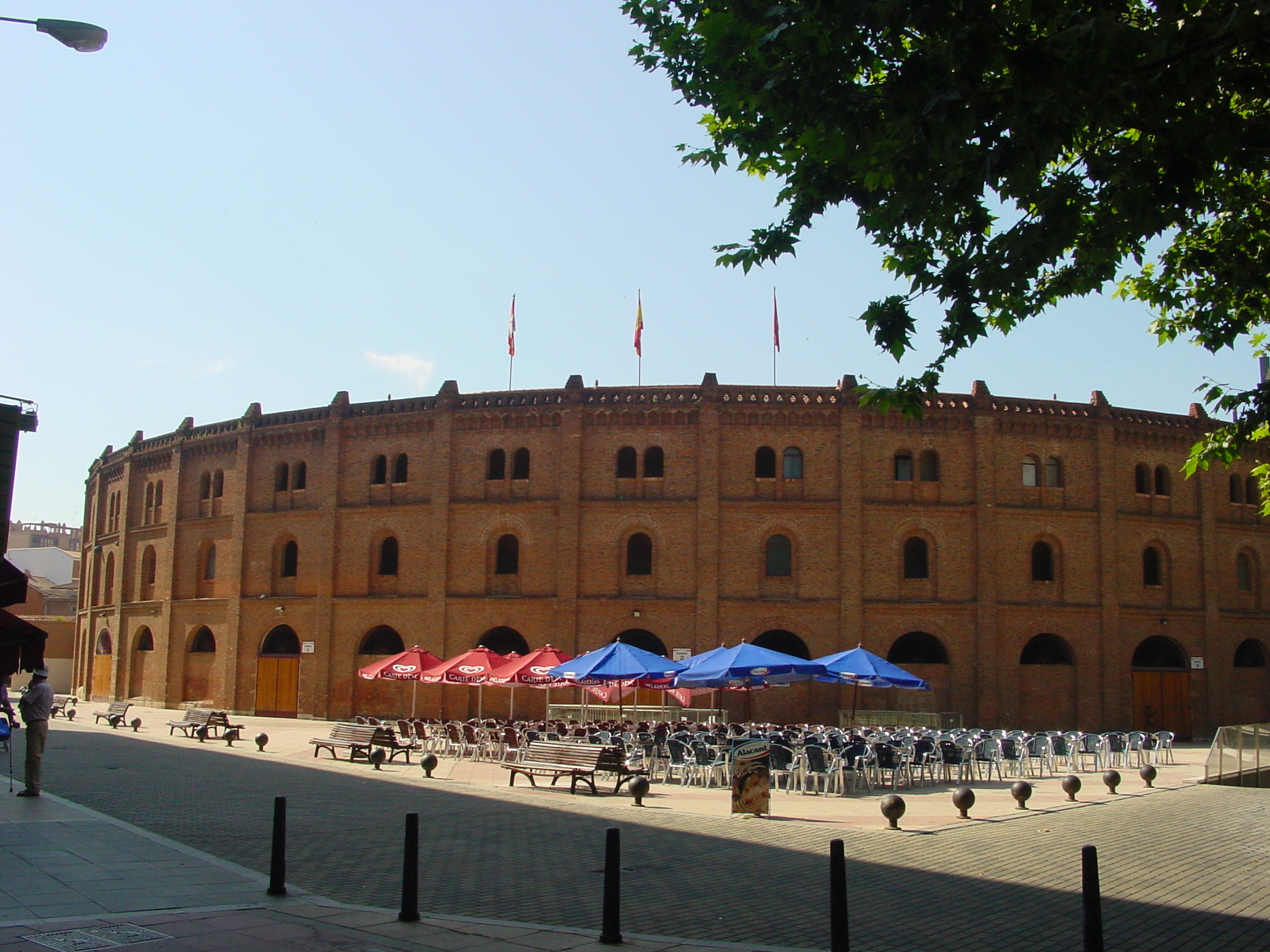 Vista de la plaza de toros de la ciudad de Valladolid (España).